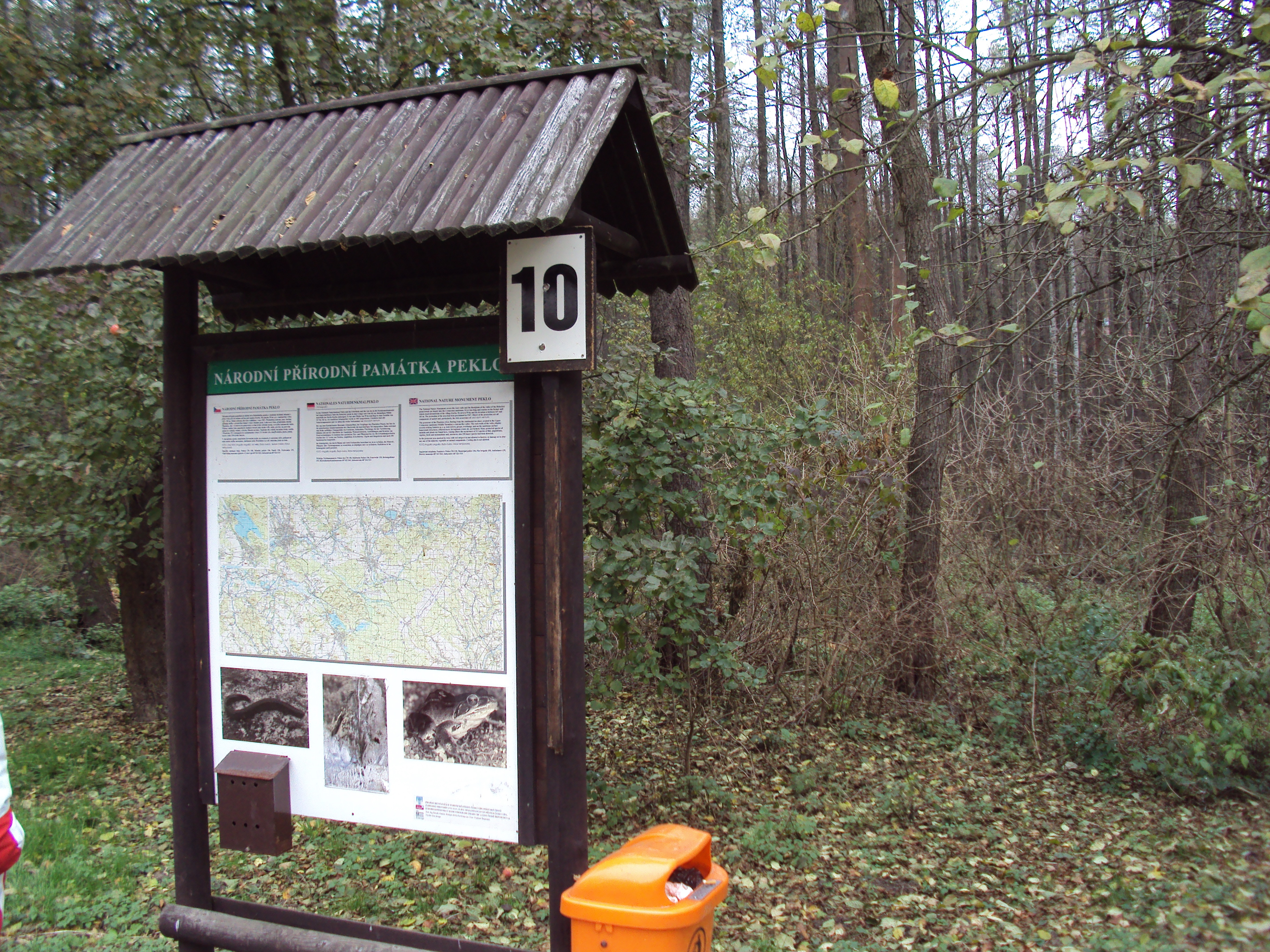 Cedule č.10 v PP Peklo